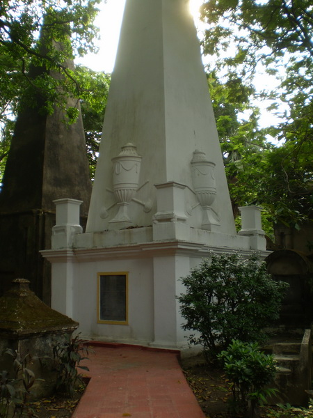 Sir Willium Jones tomb at Kolkata